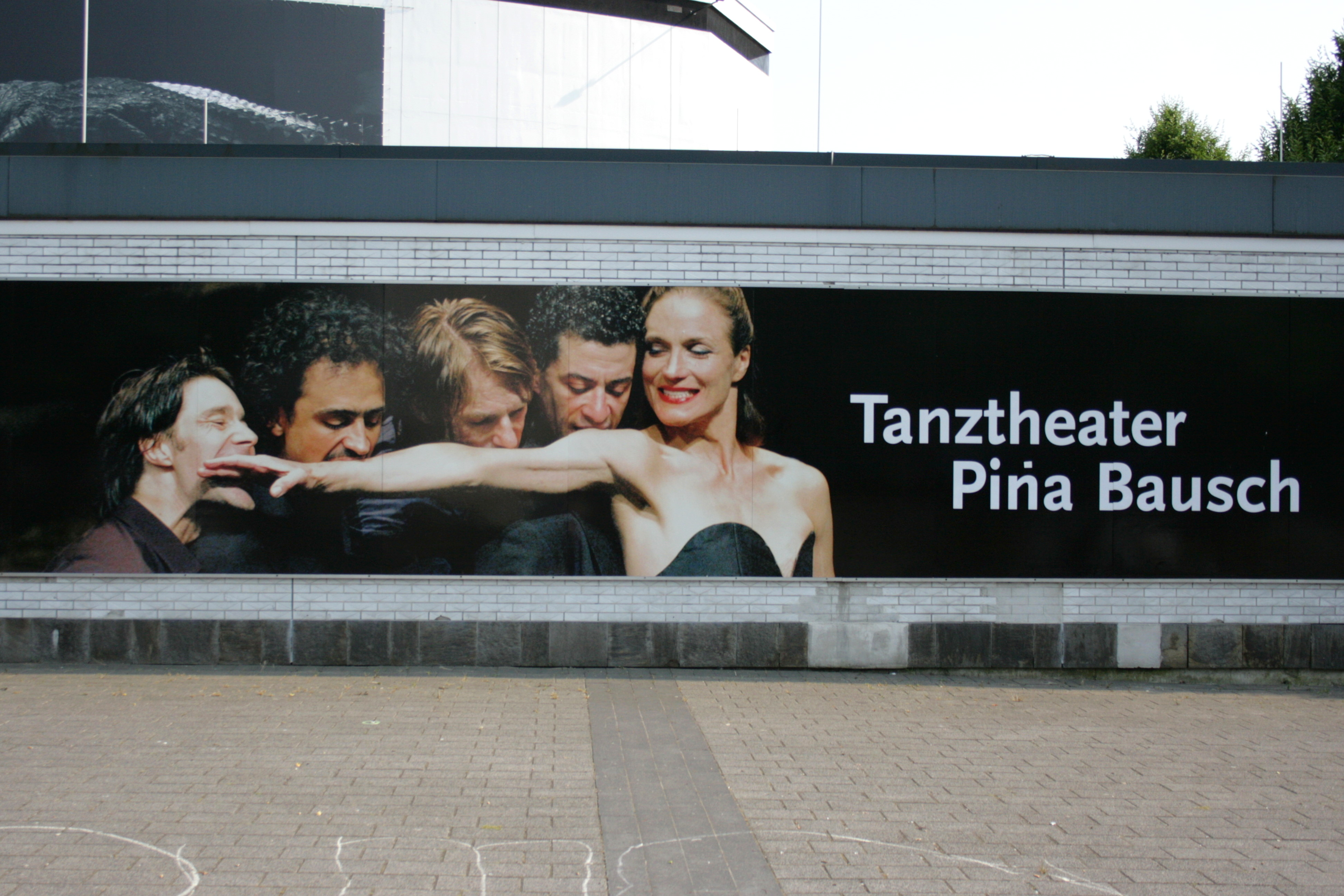 Wuppertal-Elberfeld, Schauspielhaus